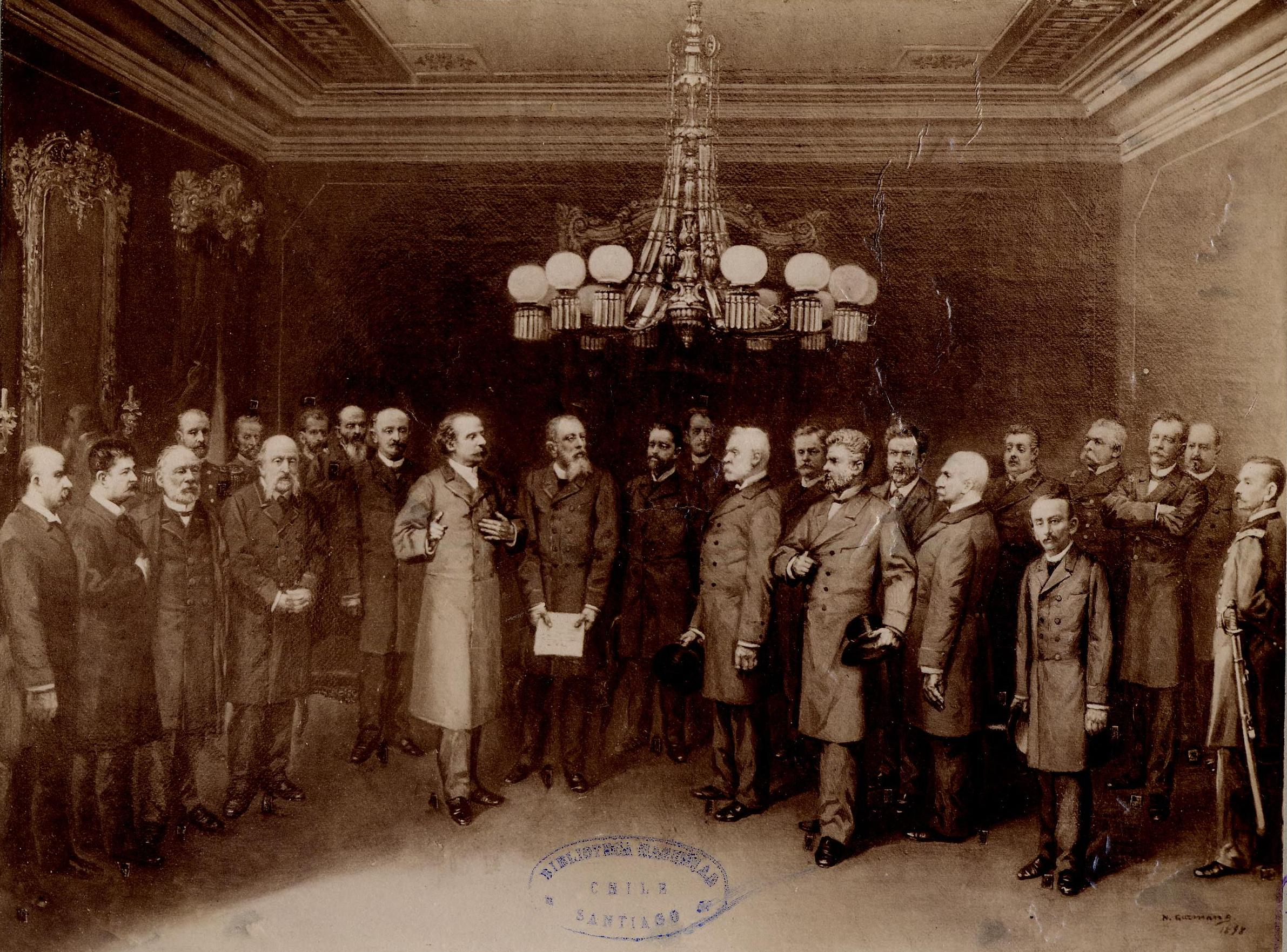 Reunión de notables en el Teatro de Santiago con el Presidente José Manuel Balmaceda. "El Exmo. Sr. D. José Manuel Balmaceda contestando a la comisión del meeting habido en el Teatro Santiago el 13 de julio de 1890"